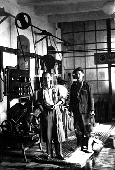 Pracownicy działu galwanizerii. 1958 rok.